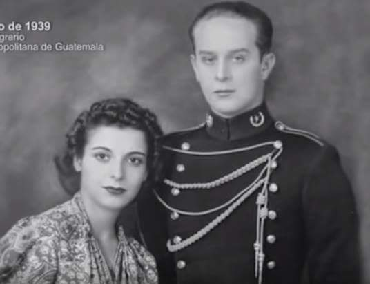 Jacobo Árbenz y su señora, María Cristina Vilanova el día de su boda en 1939.